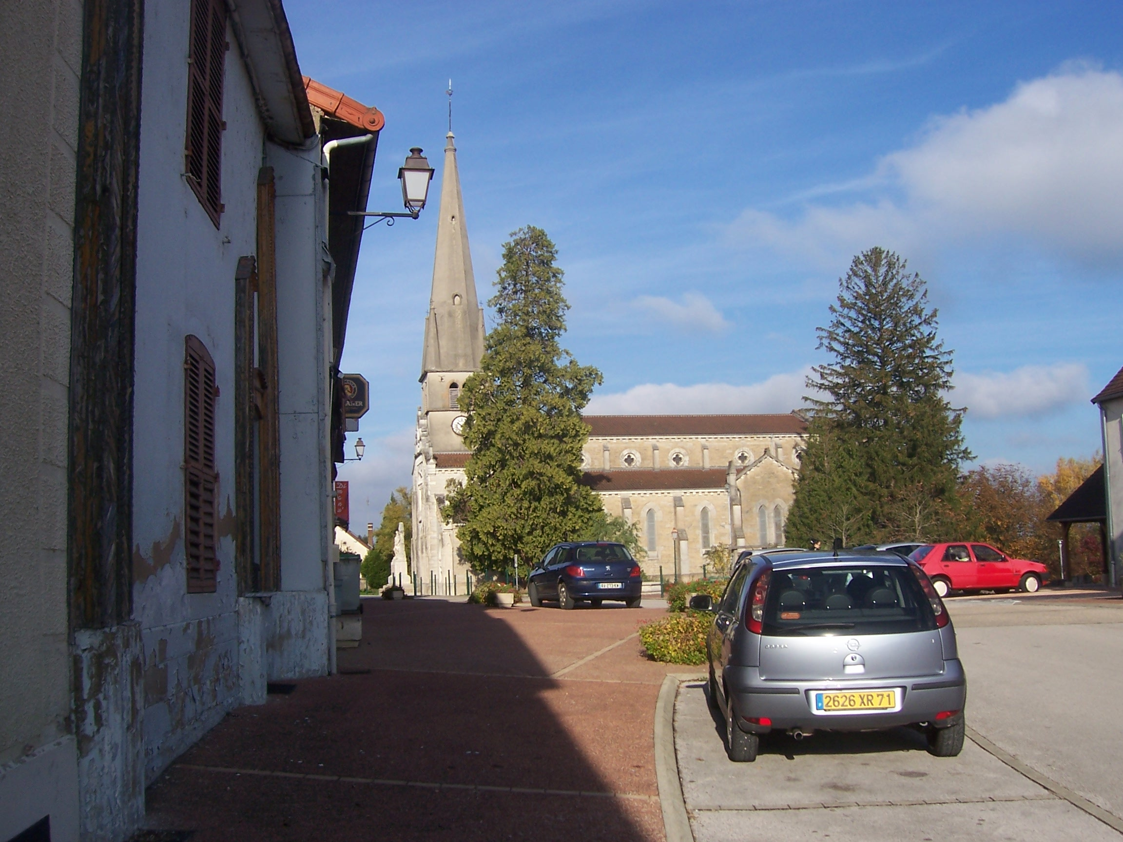 Eglise de Savigny-en-Revermont